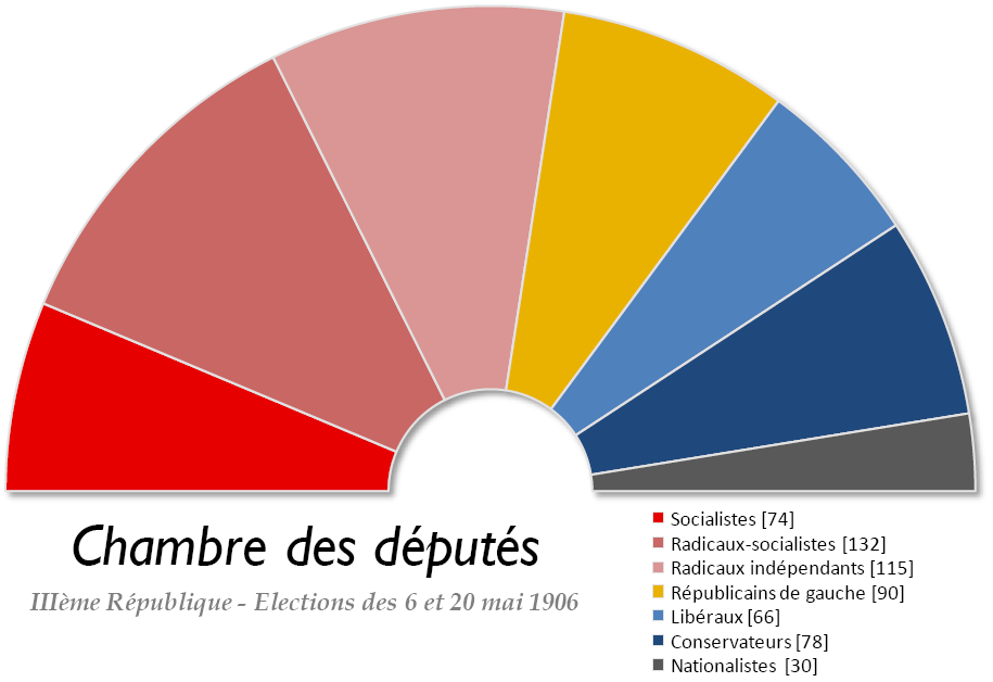 Chambre des députés française issue des élections législatives de 1906